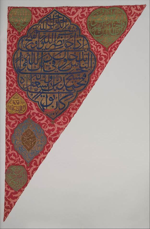 Azərbaycan Səfəvi dövlətinin bayrağı (Nyu-York, Metropoliten Muzeyi.)